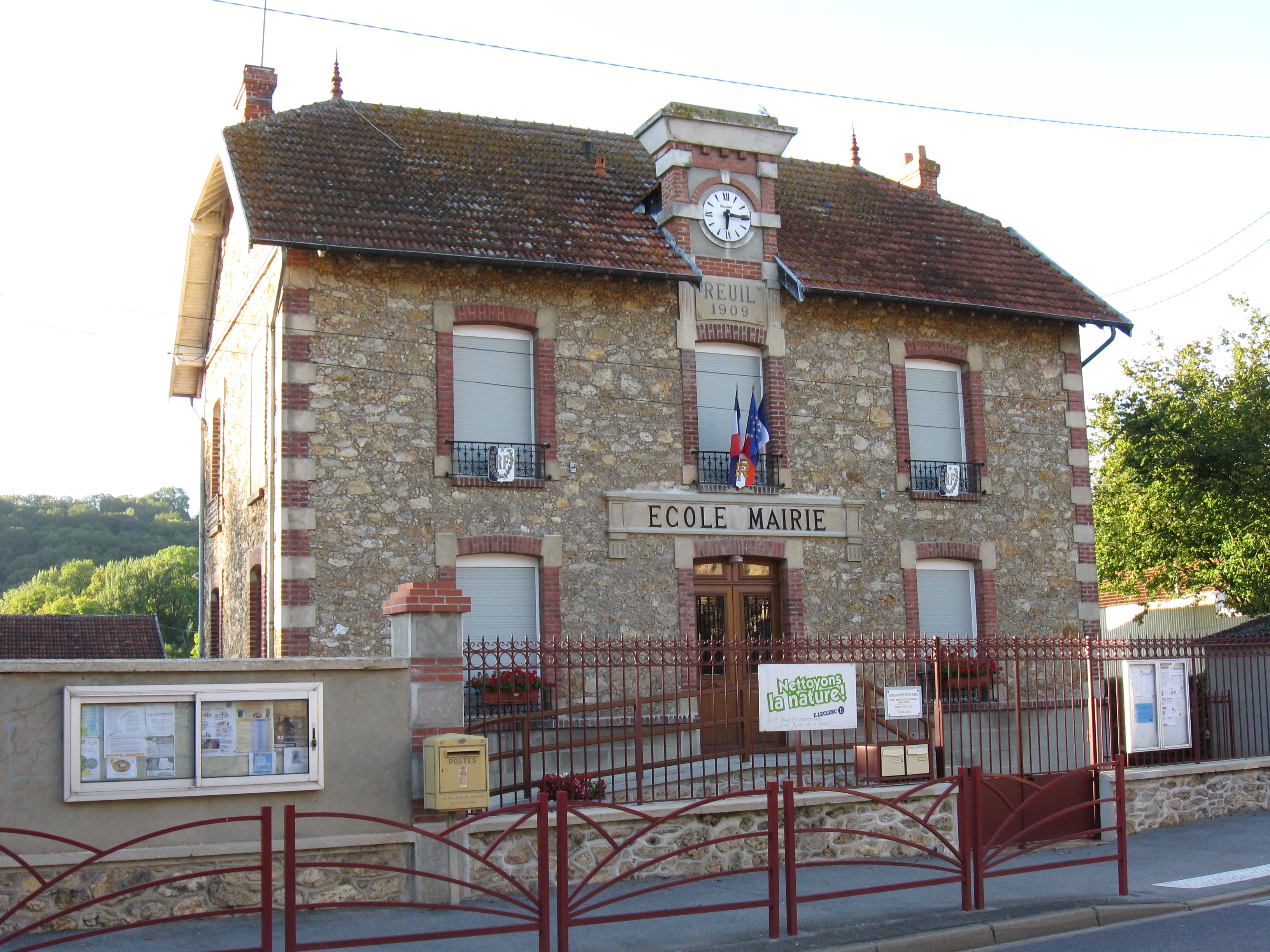 Mairie-école de Reuil-en-Brie. (département de la Seine et Marne, région Île-de-France).